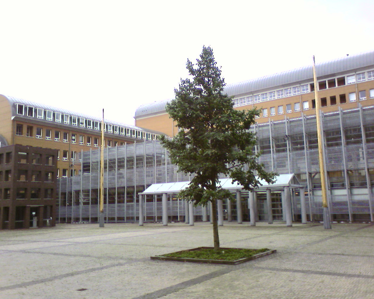 Paleis van Justitie 's-Hertogenbosch